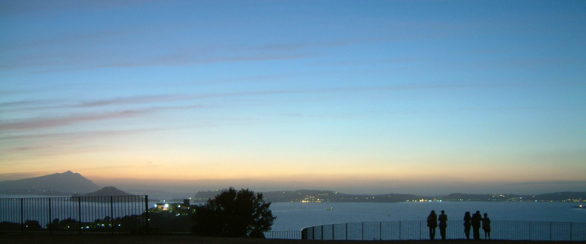 Francesco Russo, Vista dal Parco Virgiliano a Napoli, pubblico dominio, luglio 2008